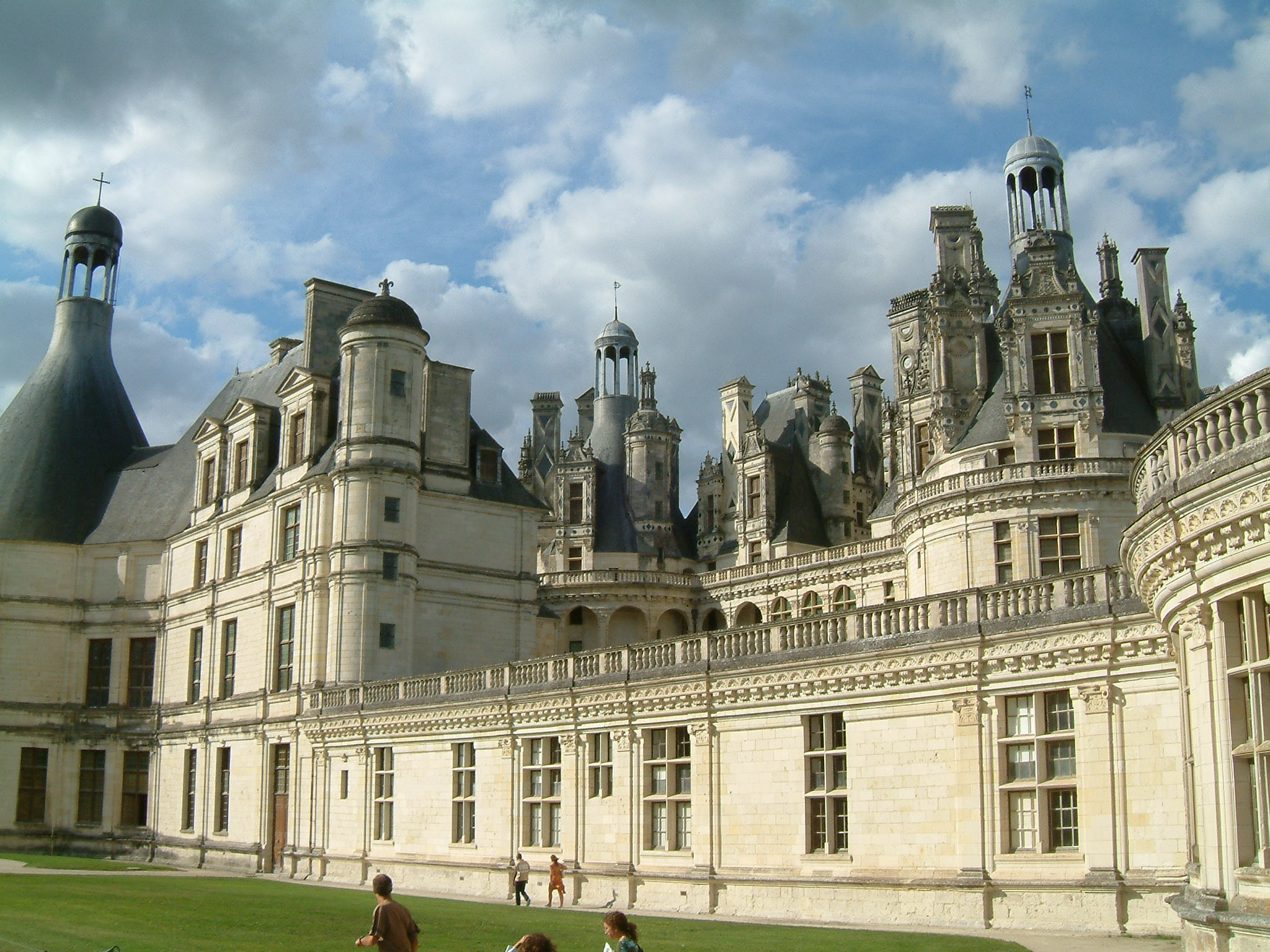 Château de Chambord, Chambord, FRANCE